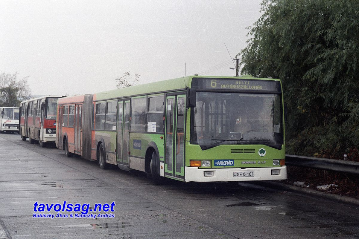 Ikarus 417 (GFX-101) szuperalacsony-padlós városi-elővárosi csuklós autóbusz a salgótarjáni helyi buszállomáson (gyártási év: 1994)